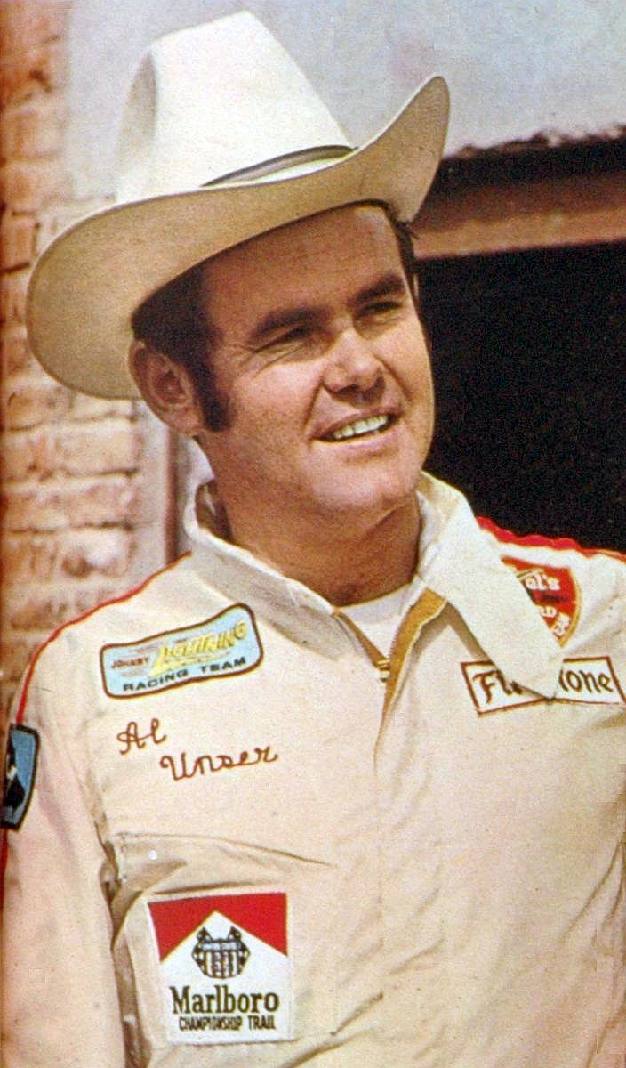 Al Unser Marzo de 1971 (02) El Gráfico 2682 (cropped).